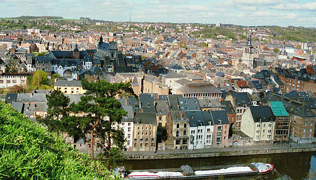 Vue du Quartier des Brasseurs depuis la citadelle de Namur.